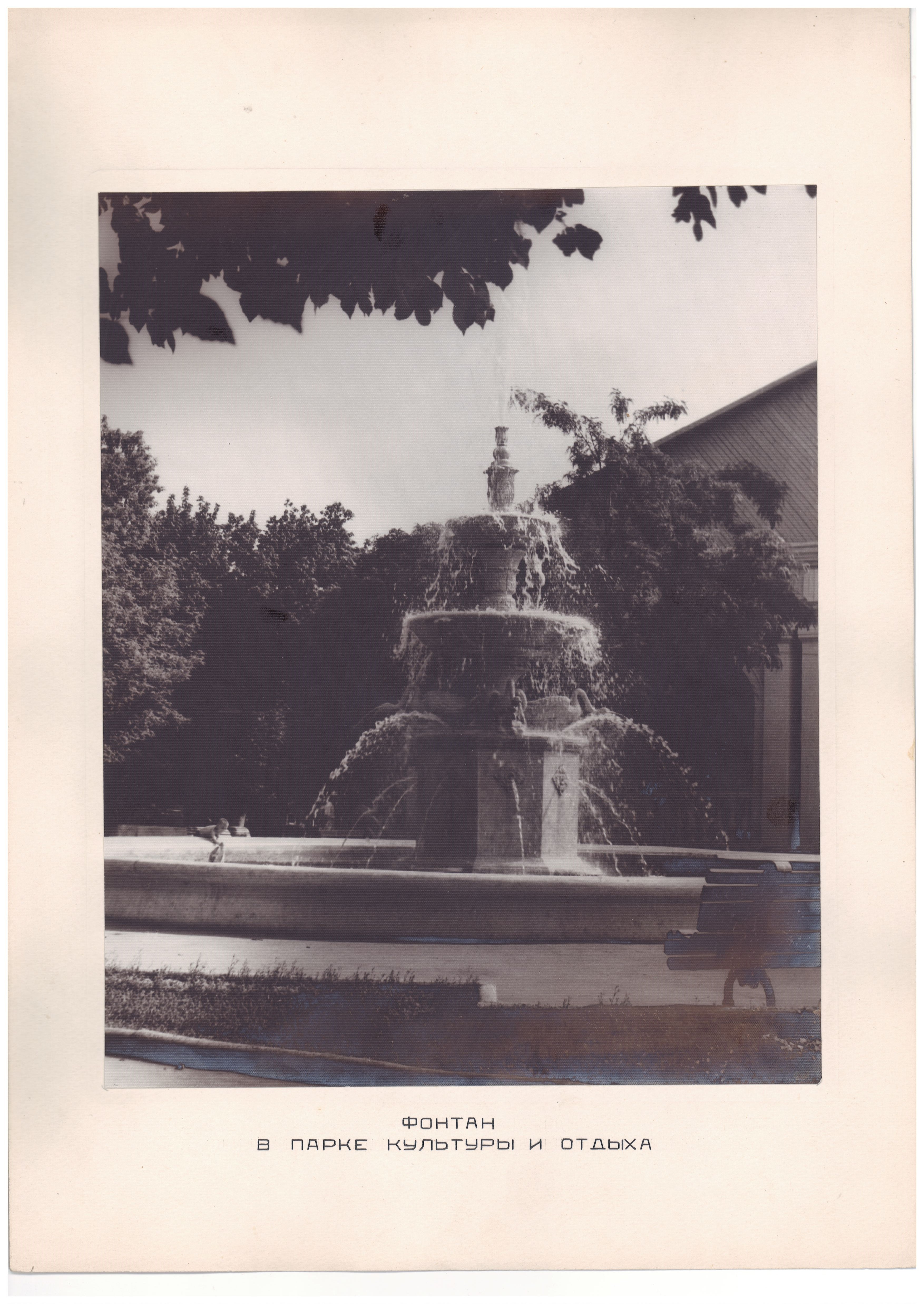 Город Шахты. Фонтан в парке культуры и отдыха (1920-1930г.г.)